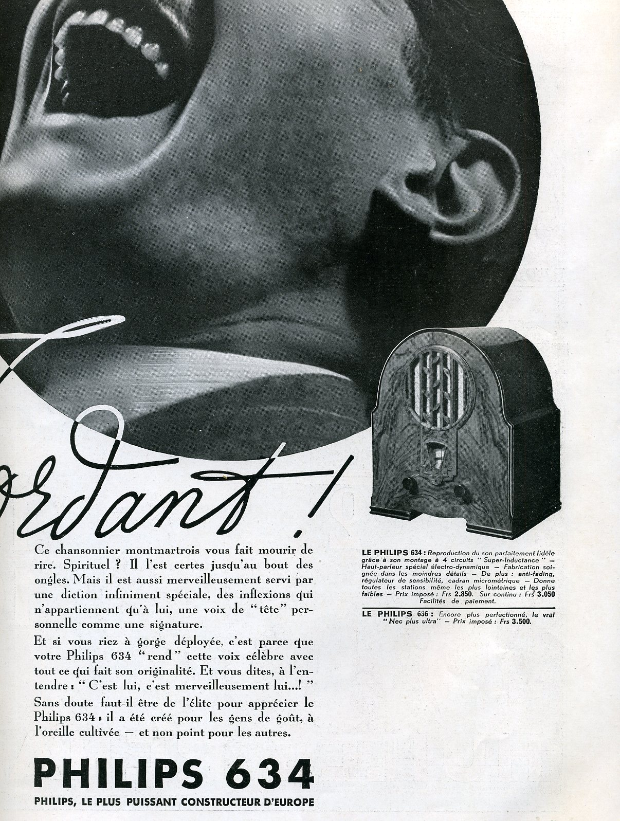 Philips 634